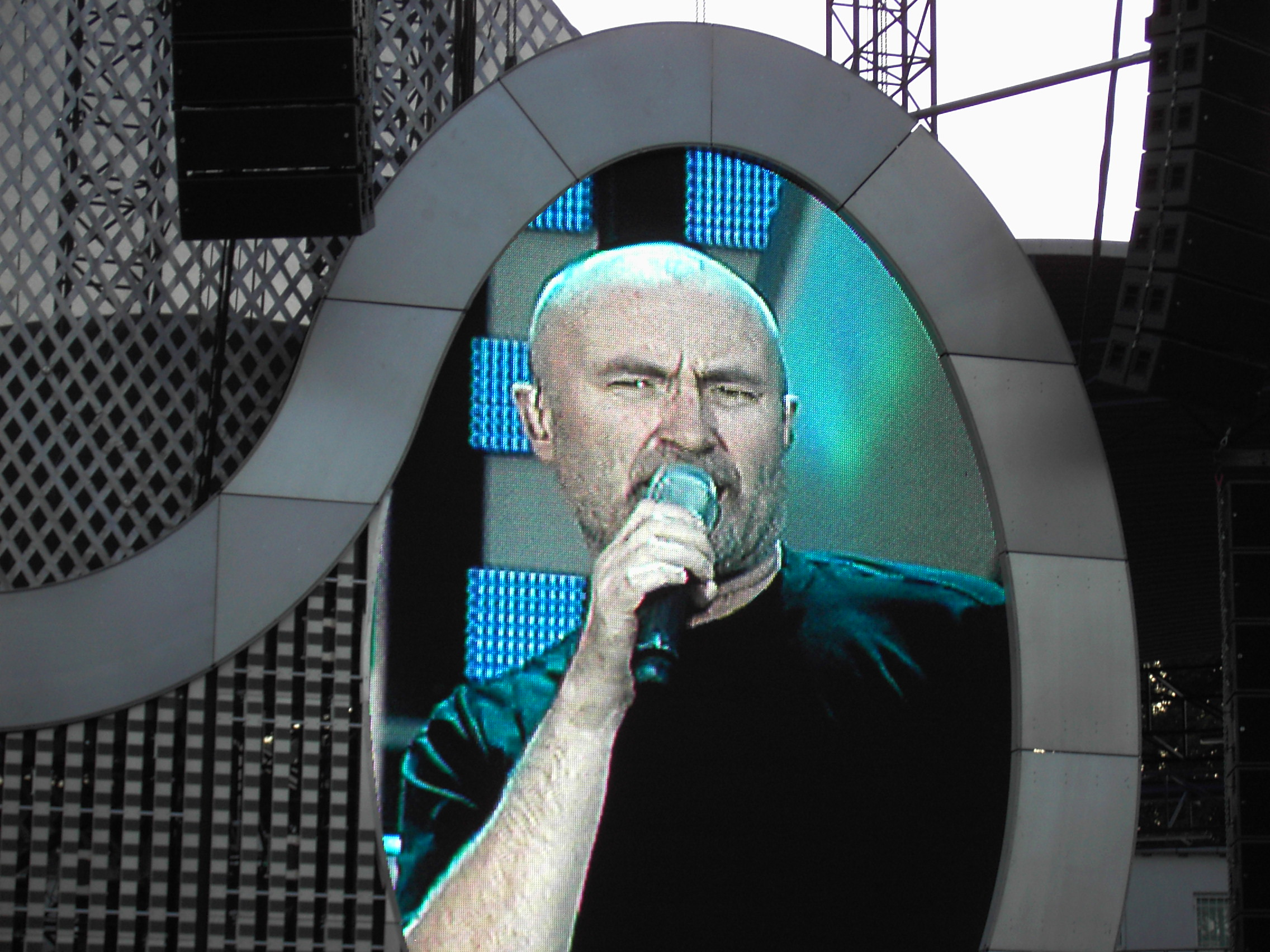 Genesis in Linz am 19. Juni 2007.